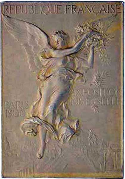 Медаль Летних Олимпийских игр 1900 года